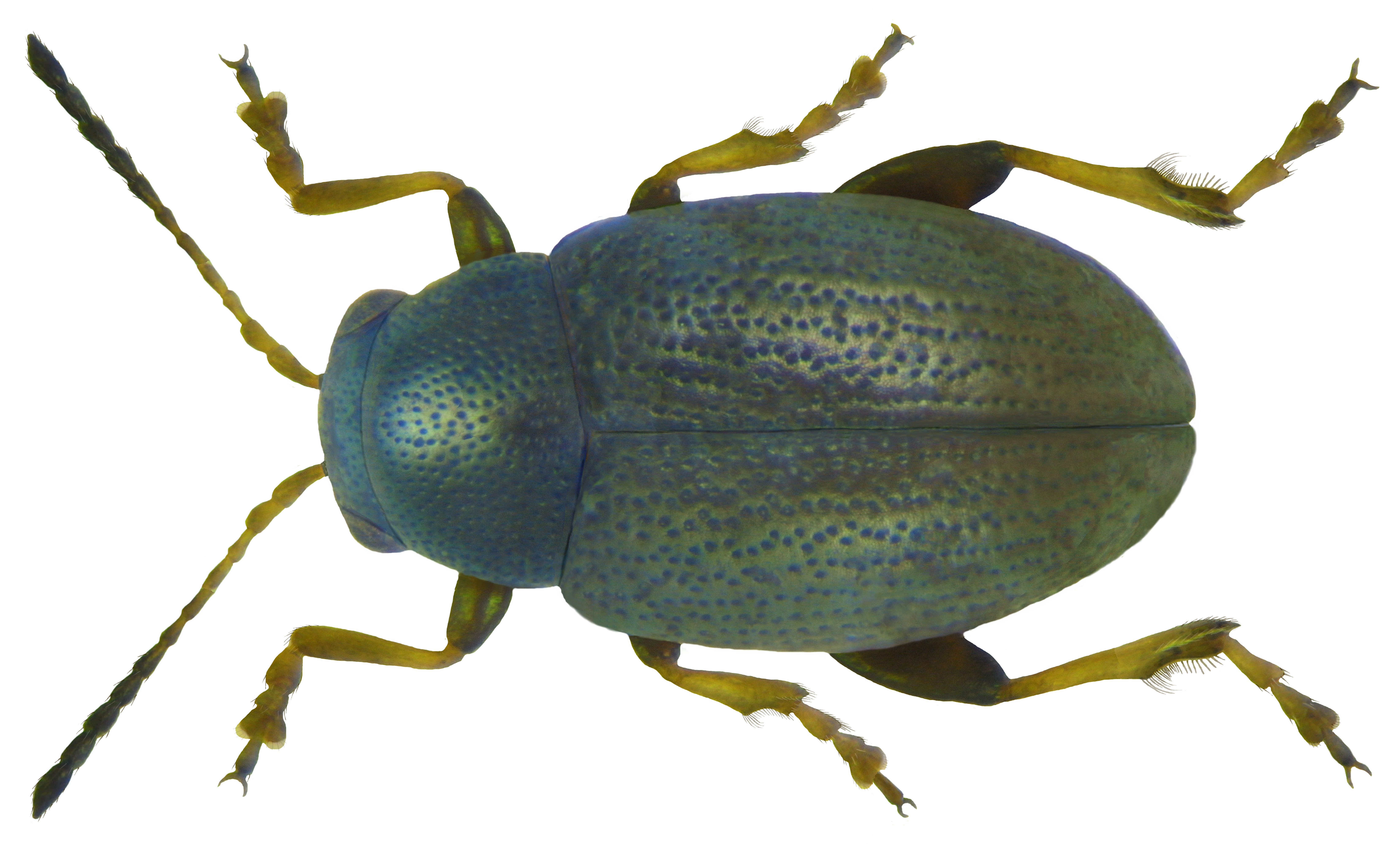 Familie: Chrysomelidae Groesse: 1,5-2,3 mm Verbreitung: Europa Oekologie: an verschiedenen Gräsern Fundort: Germania, Bayern, Oberfranken, Kulmbach leg.det. U.Schmidt, 1973 Photo: U.Schmidt, 2011